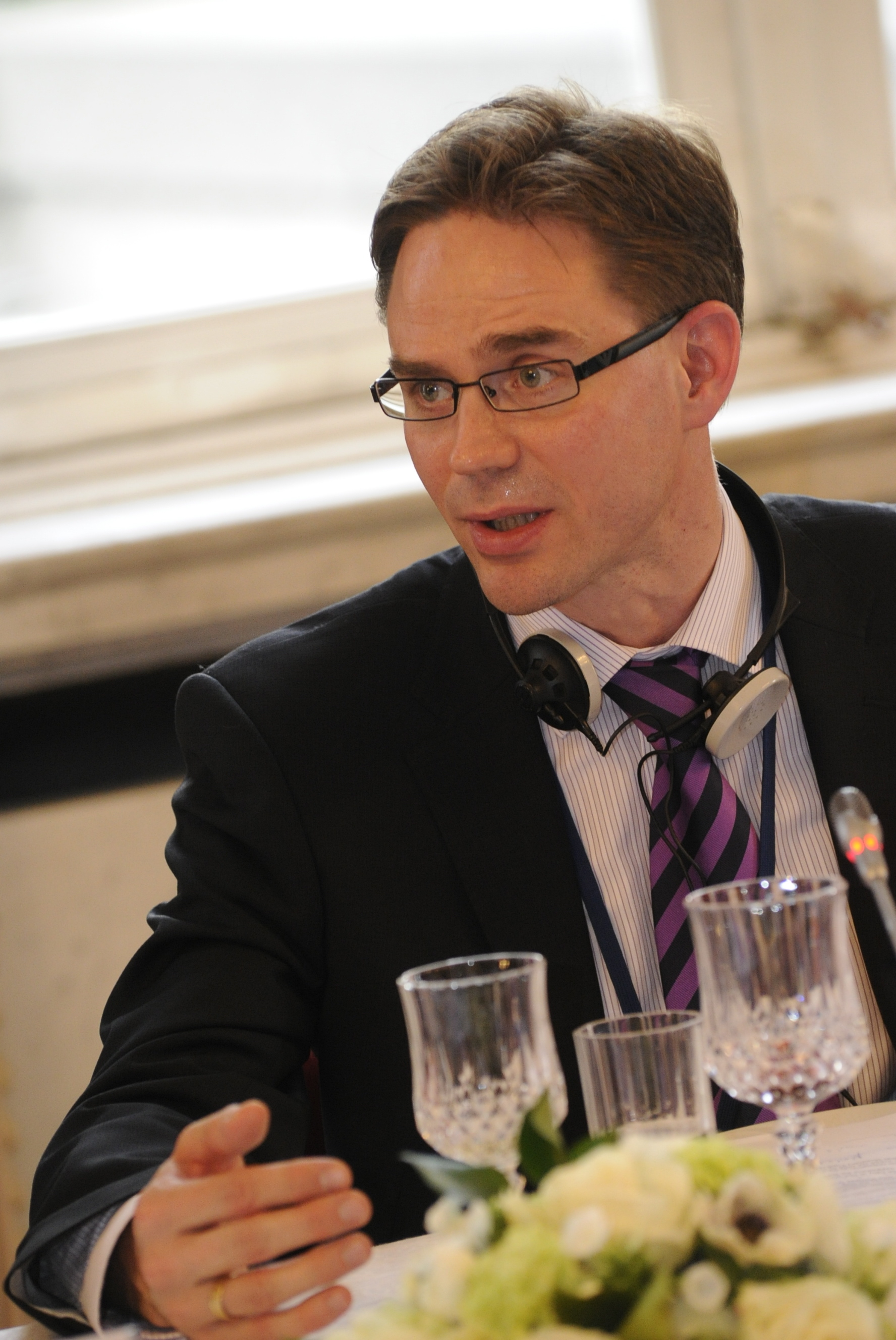 EPP Summit Brussels 25 March 2010 (224)